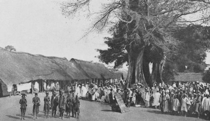 "Le marché de Kankan (Haute-Guinée). Cette ville ou doit aboutir le chemin de fer de Guinée est le plus gros marché d'approvisionnement du caoutchouc"